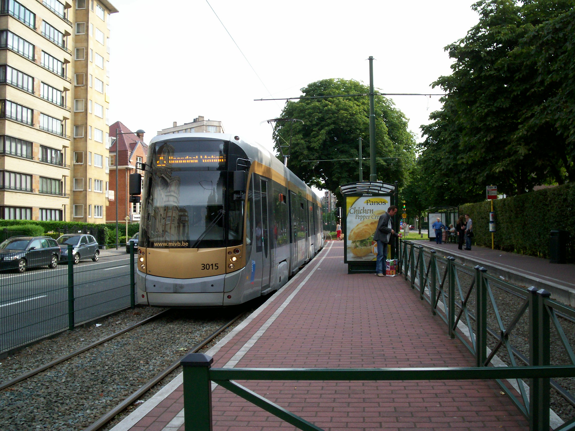 Tram de la ligne 25 à Pétillon en direction de Boondael